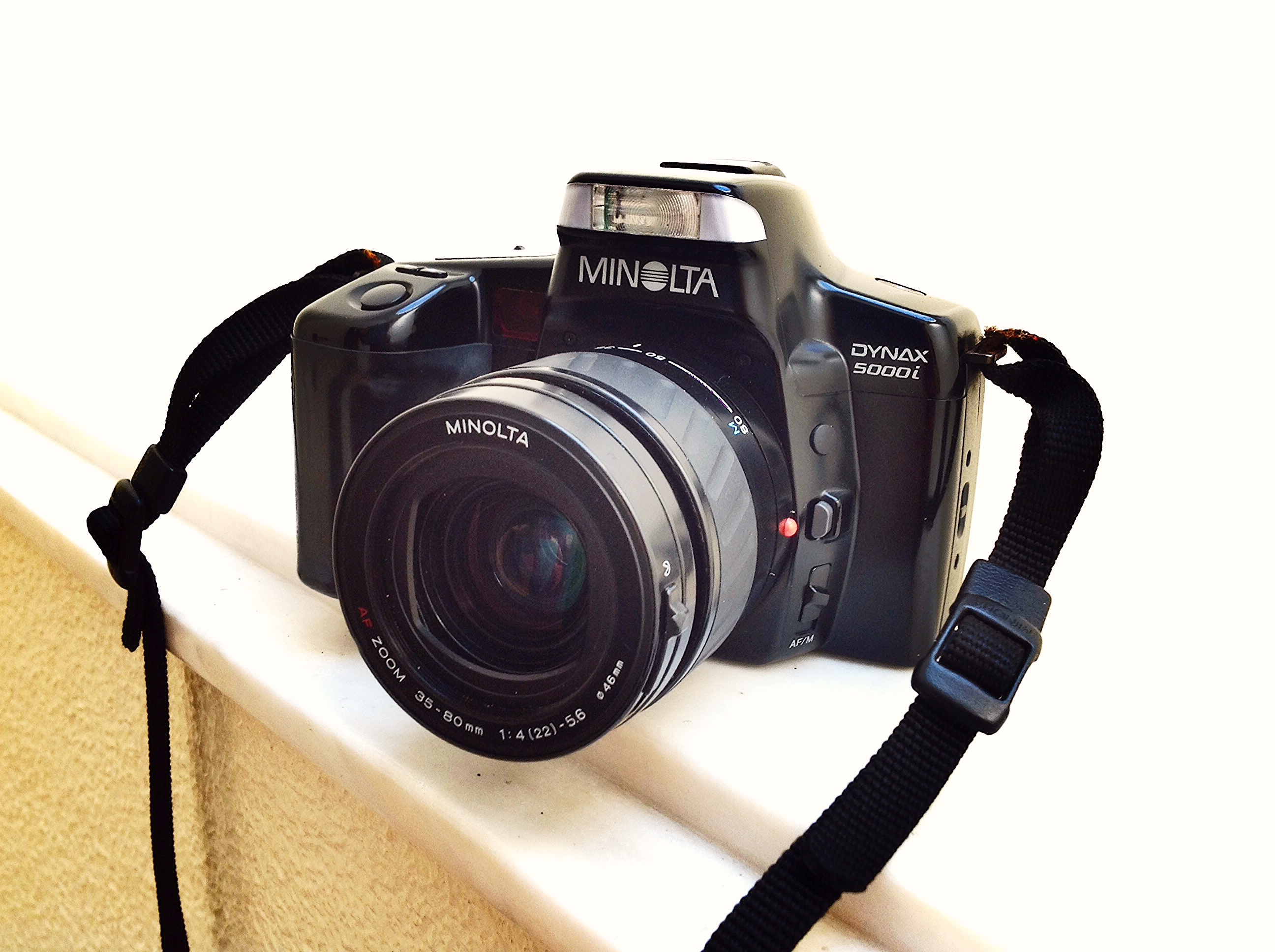 MINOLTA - Dynax 5000 I , 1984